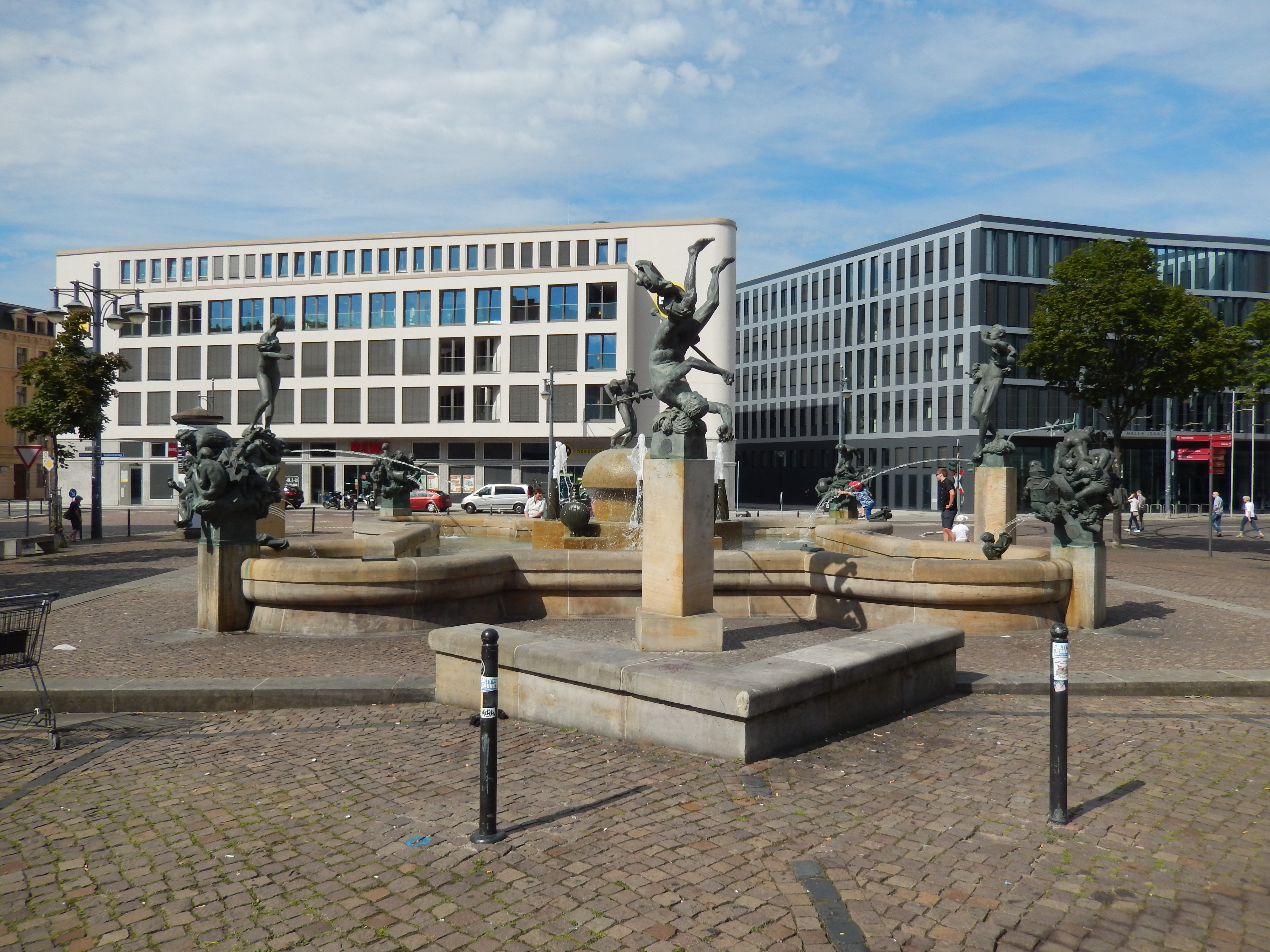 Göbelbrunnen in Halle (Saale)